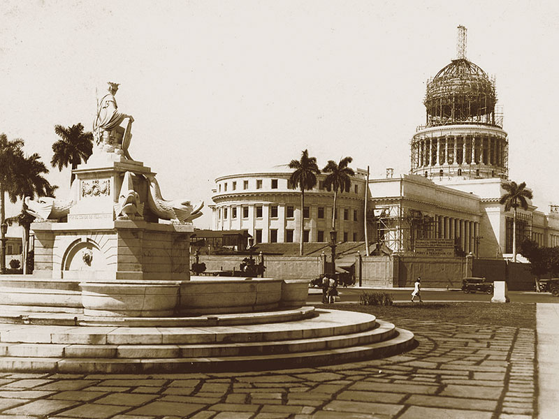 El Capitolio de La Habana, bajo construcción, entre 1925 y 1928.